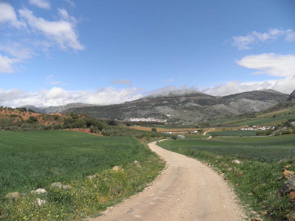 Sierra de Enmedio, Málaga